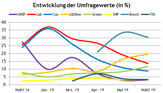 Europawahl UK 2019 Umfragen